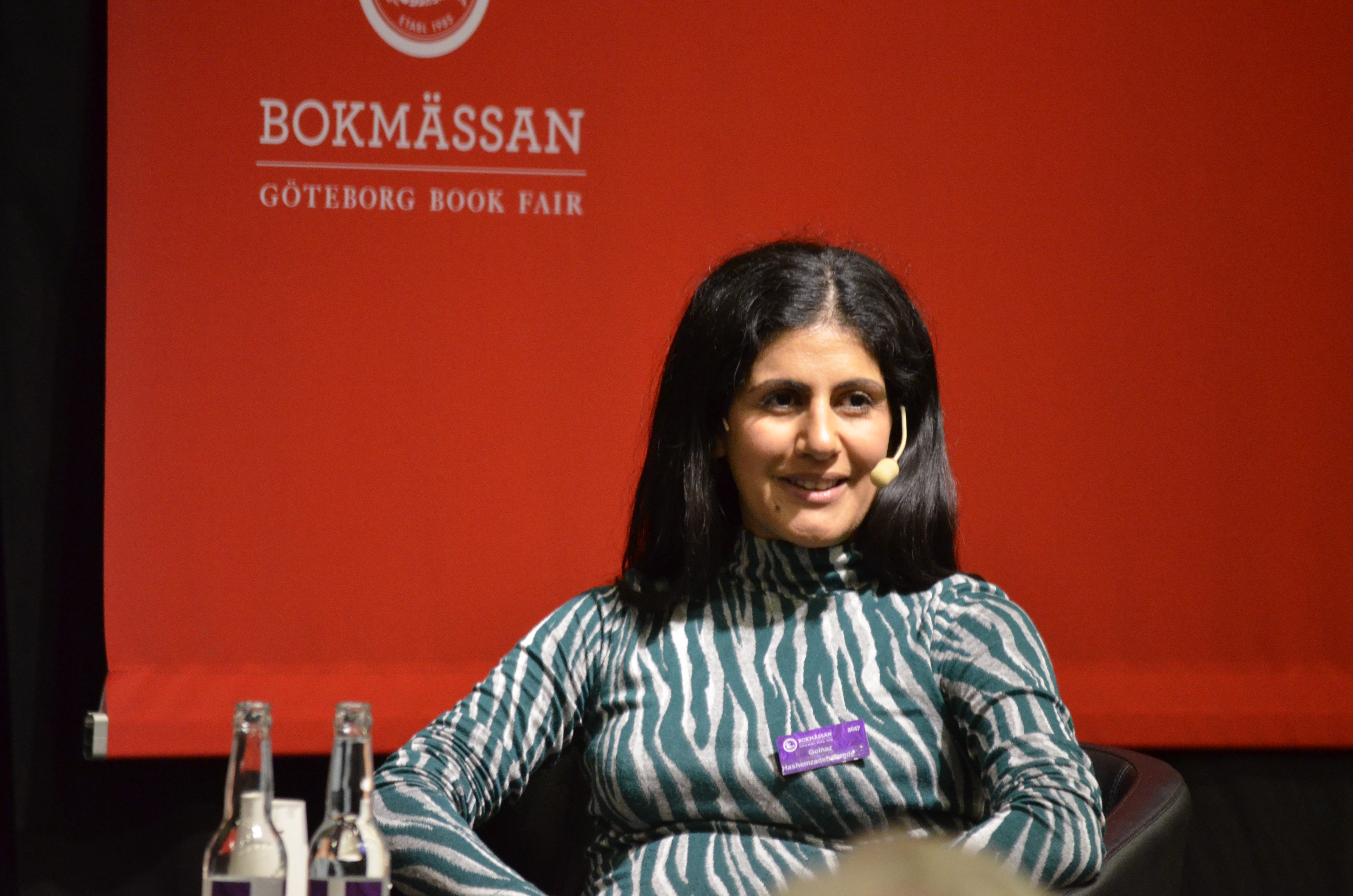 Golnaz Hashemzadeh Bonde Bokmässan Göteborg 2017